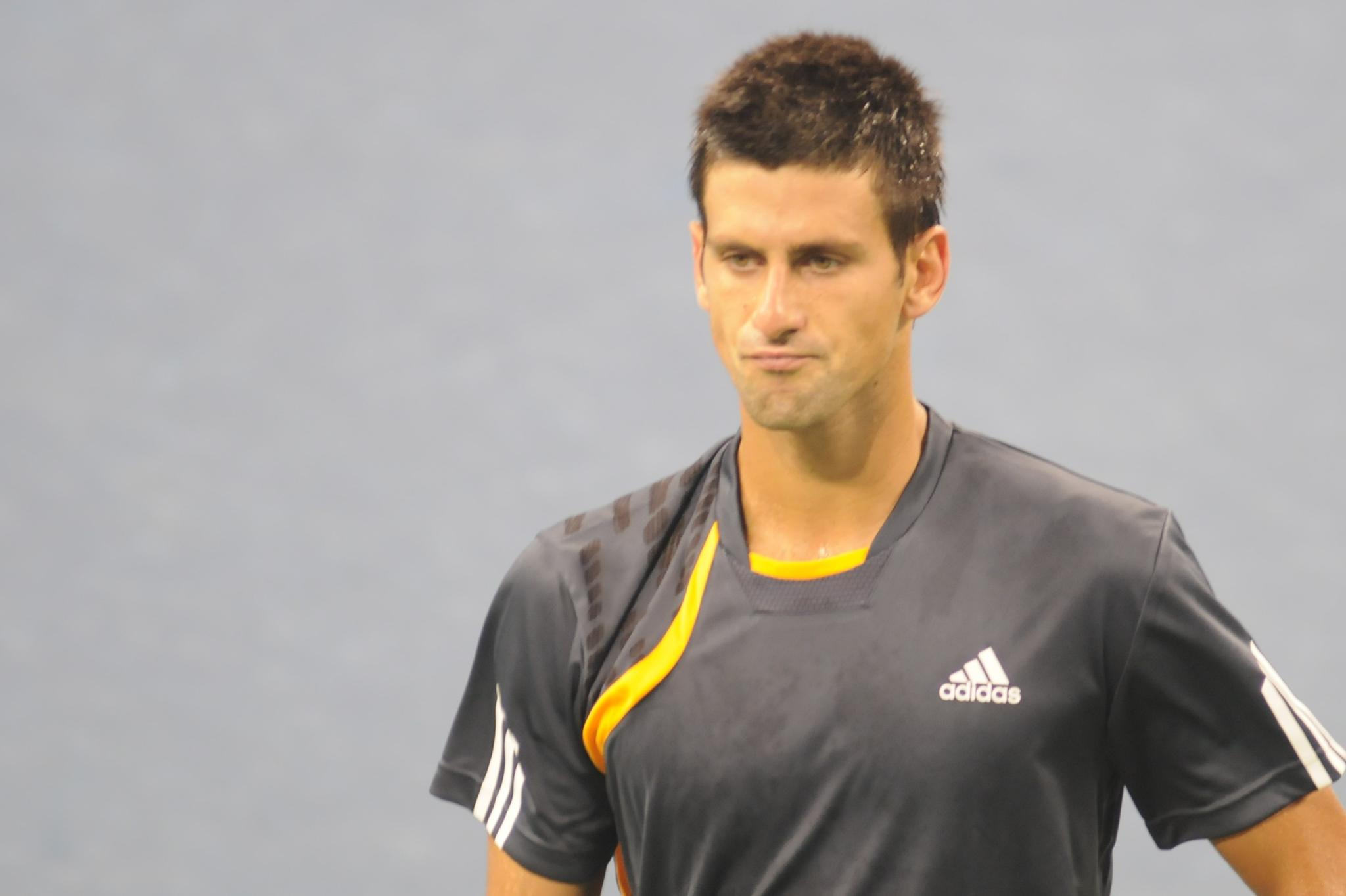 Novak Đoković at the 2009 US Open